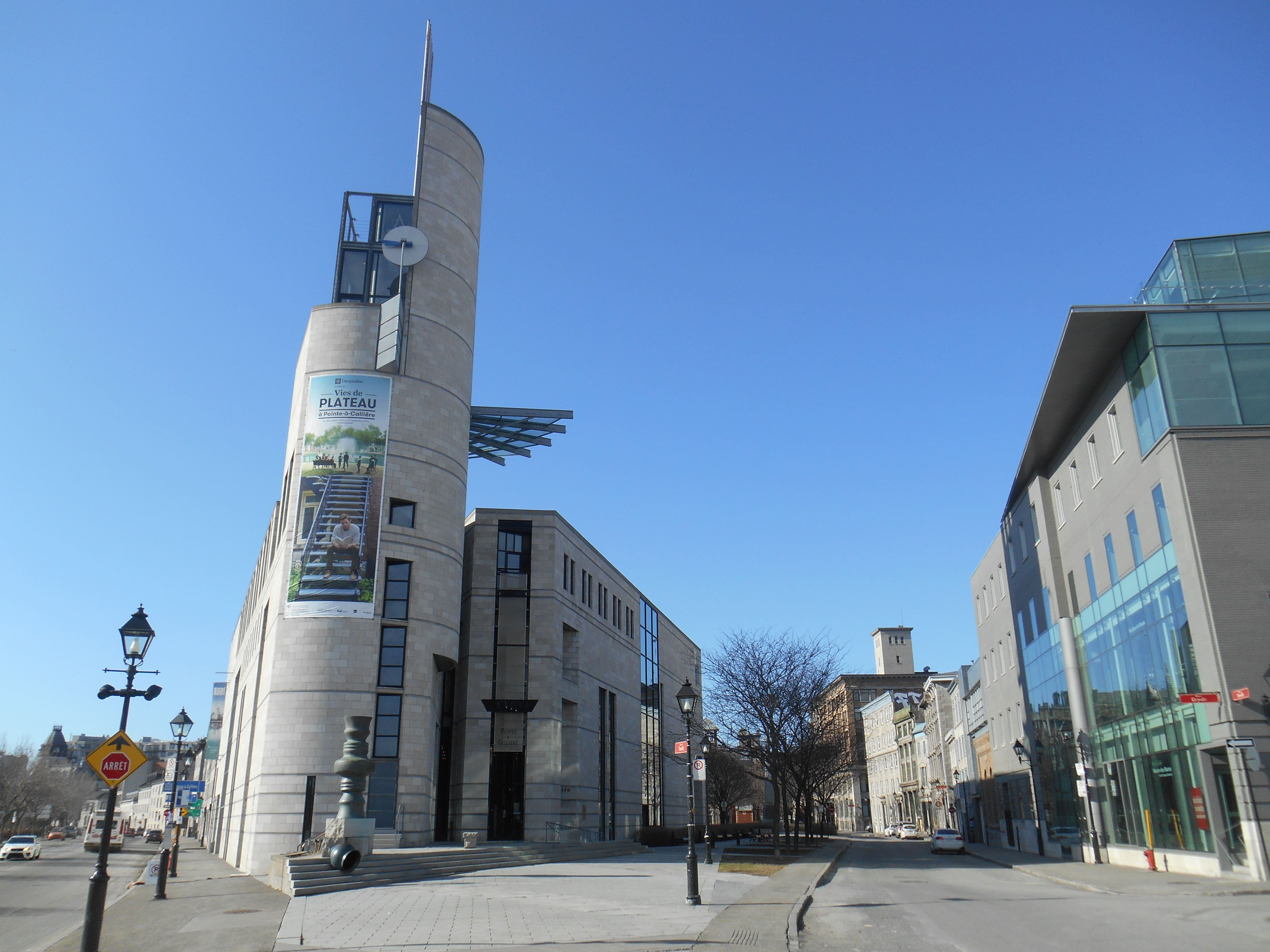 Pointe-à-Callière, musée d'archéologie et d'histoire de Montréal À gauche : L'Éperon À droite : La Maison-des-Marins, 165-169 Place d'Youville